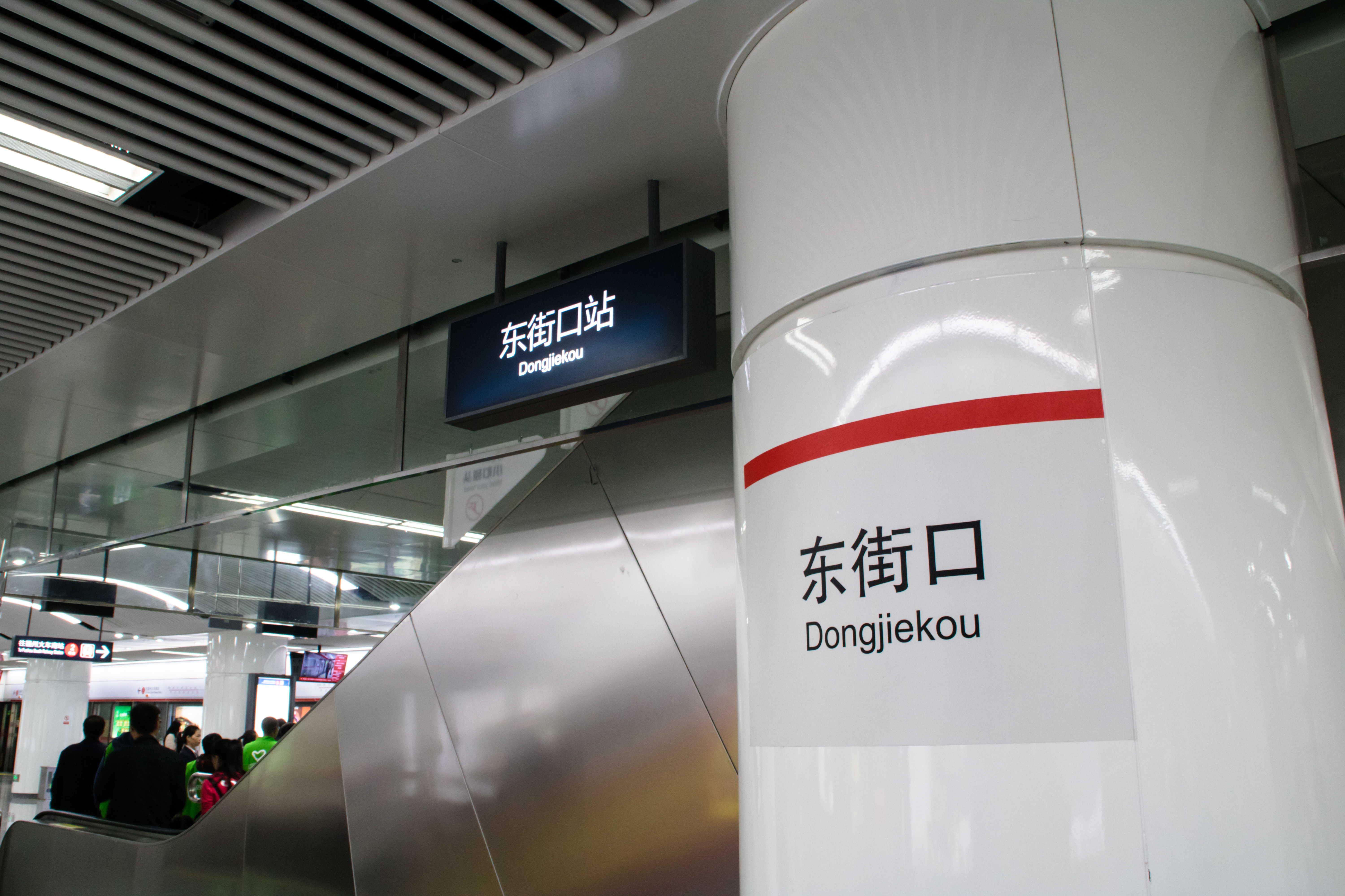 东街口站站名牌